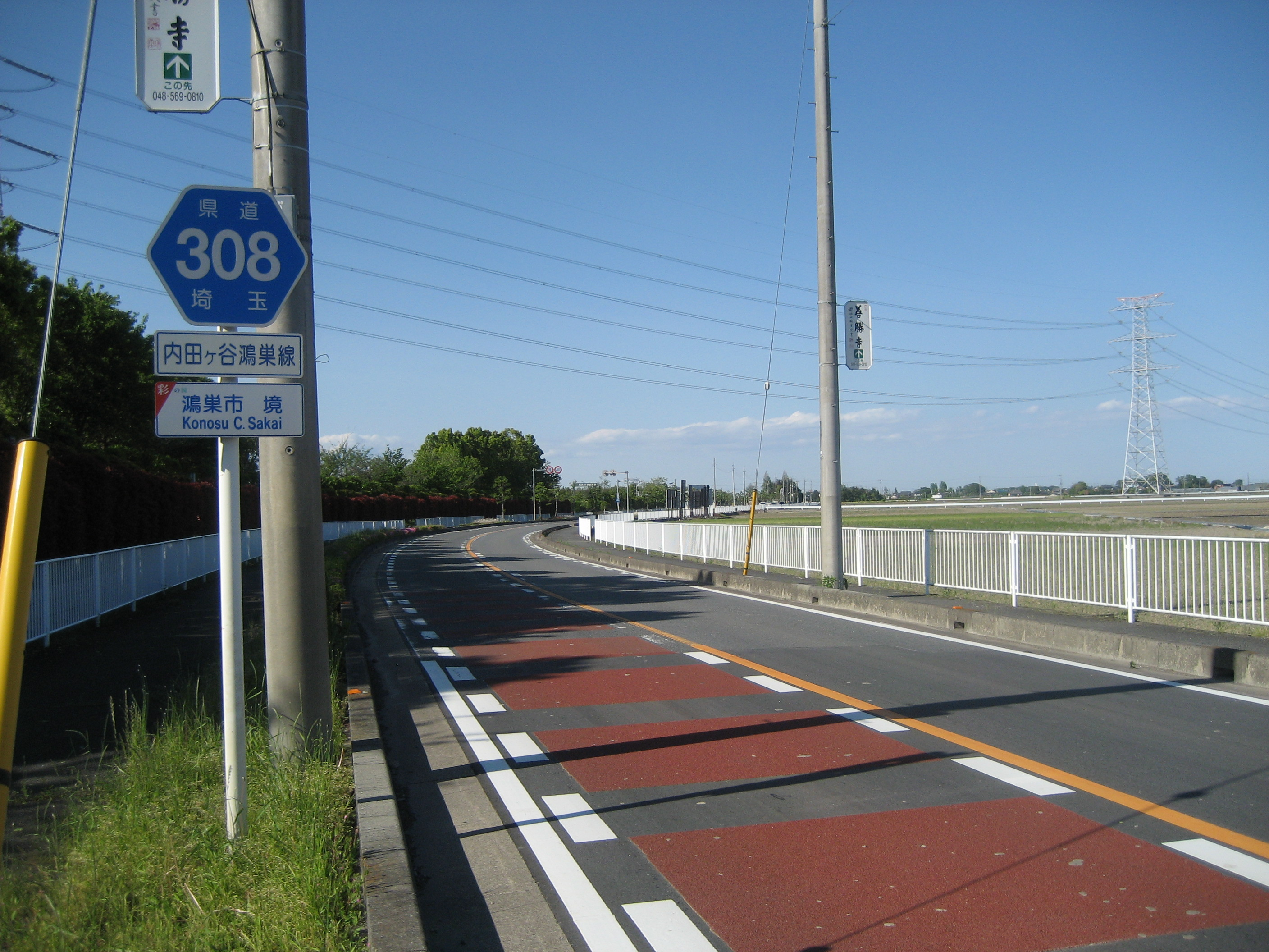 埼玉県道308号線鴻巣市内１